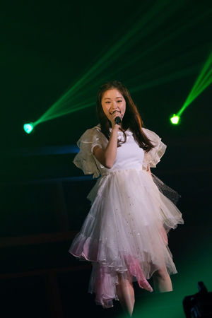 やのあんなライブ写真